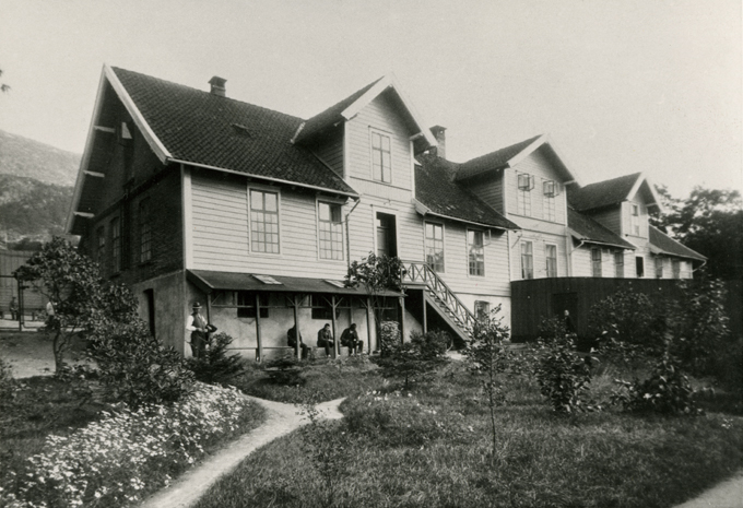 Bildet er hentet fra arkivet etter Møllendal asyl, oppbevart ved Bergen Byarkiv.